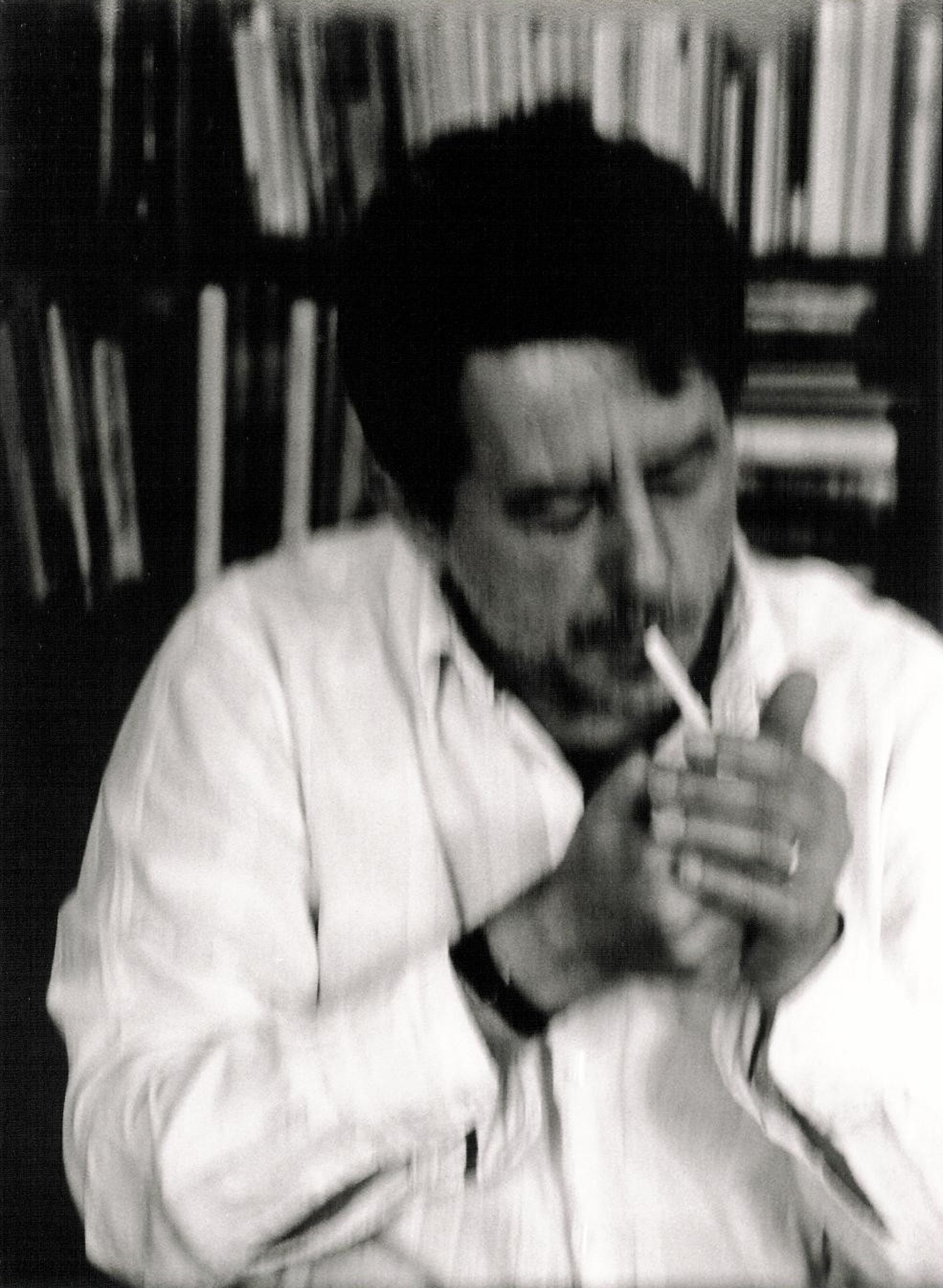 Tereza z Davle, fotografické dílo Martin Němec